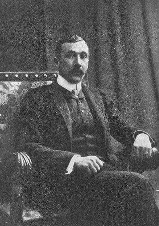 Дмитрий Федорович Андро, ровенский уездный предводитель дворянства, член I Государственной думы от Волынской губернии.